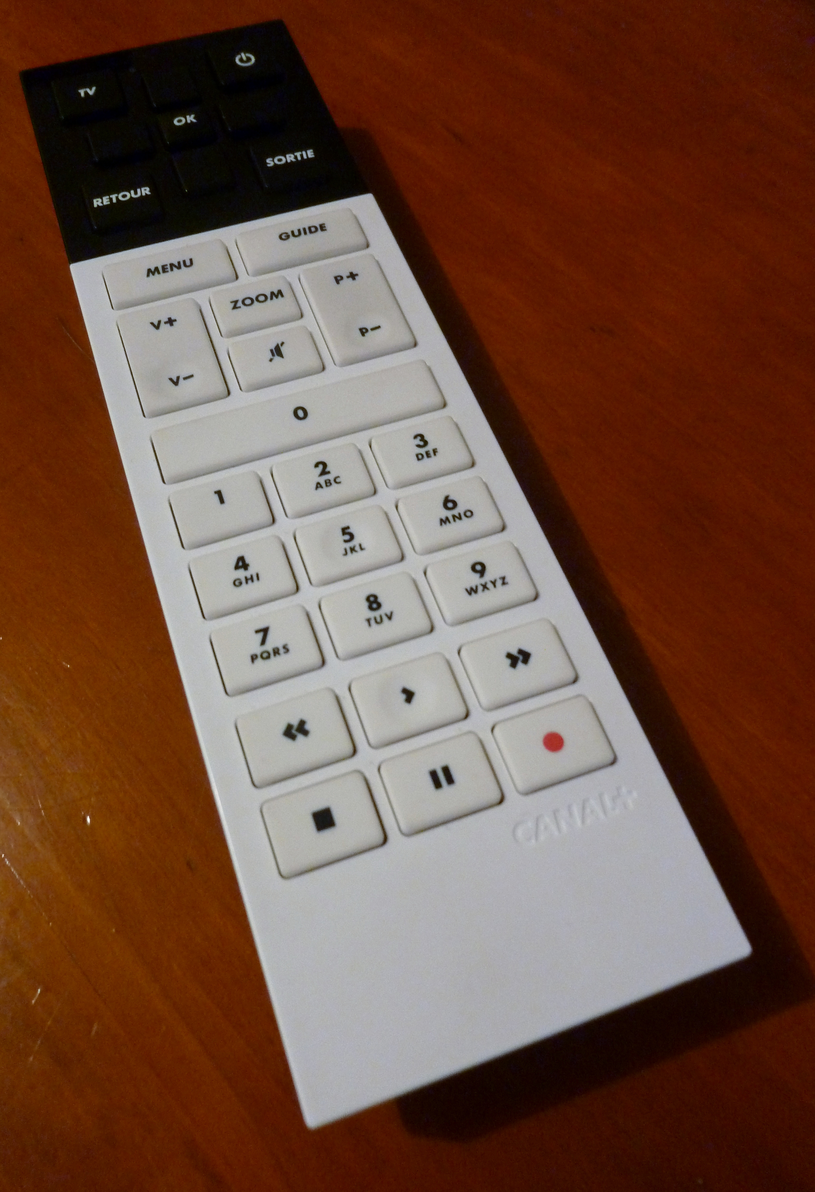 Télécommande du decodeur g5